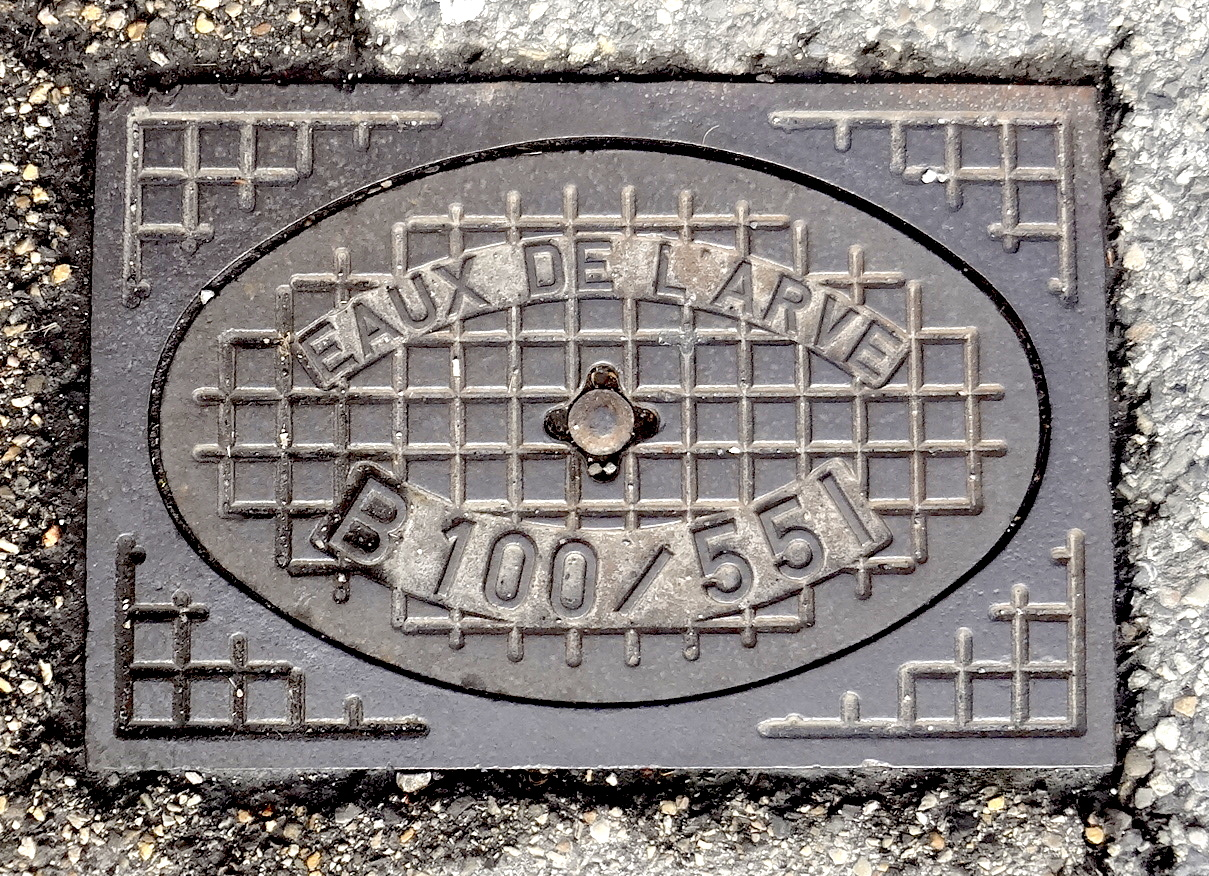 Couvercles de boîte de branchement en fonte. Eau. Avenue de Beau-Séjour à Champel, commune de Genève. « Eaux de l'Arve ».